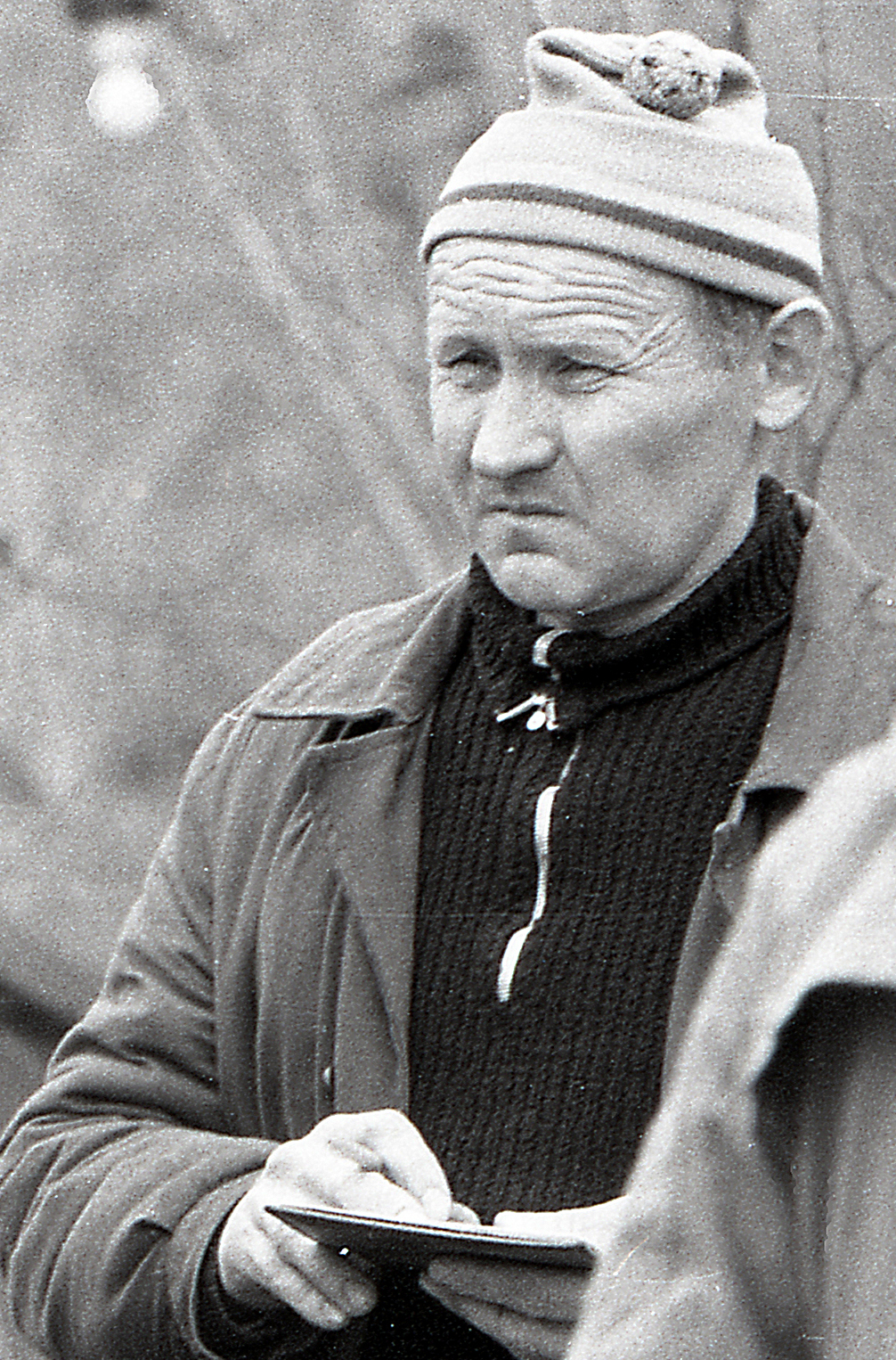 Kaljo Palmiste